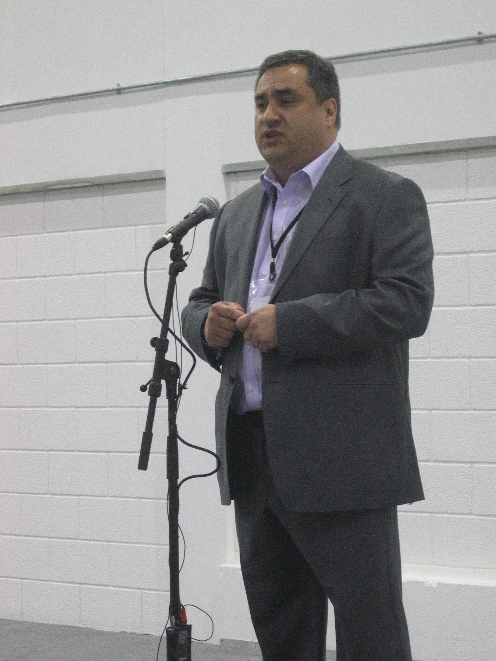 London Elections 2008, Excel count centre. Len_Duvall